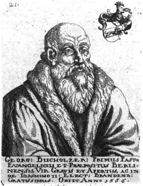 Bildnis Georg Buchholzer († 1566)